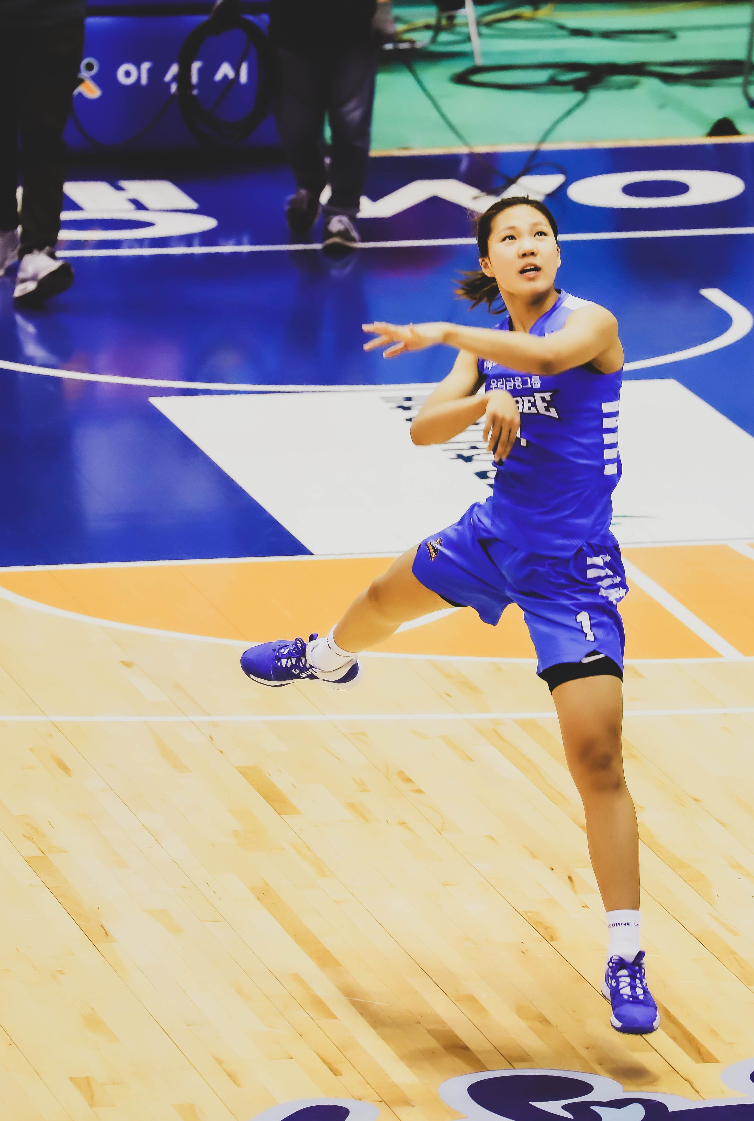 우리은행위비의 박지현선수